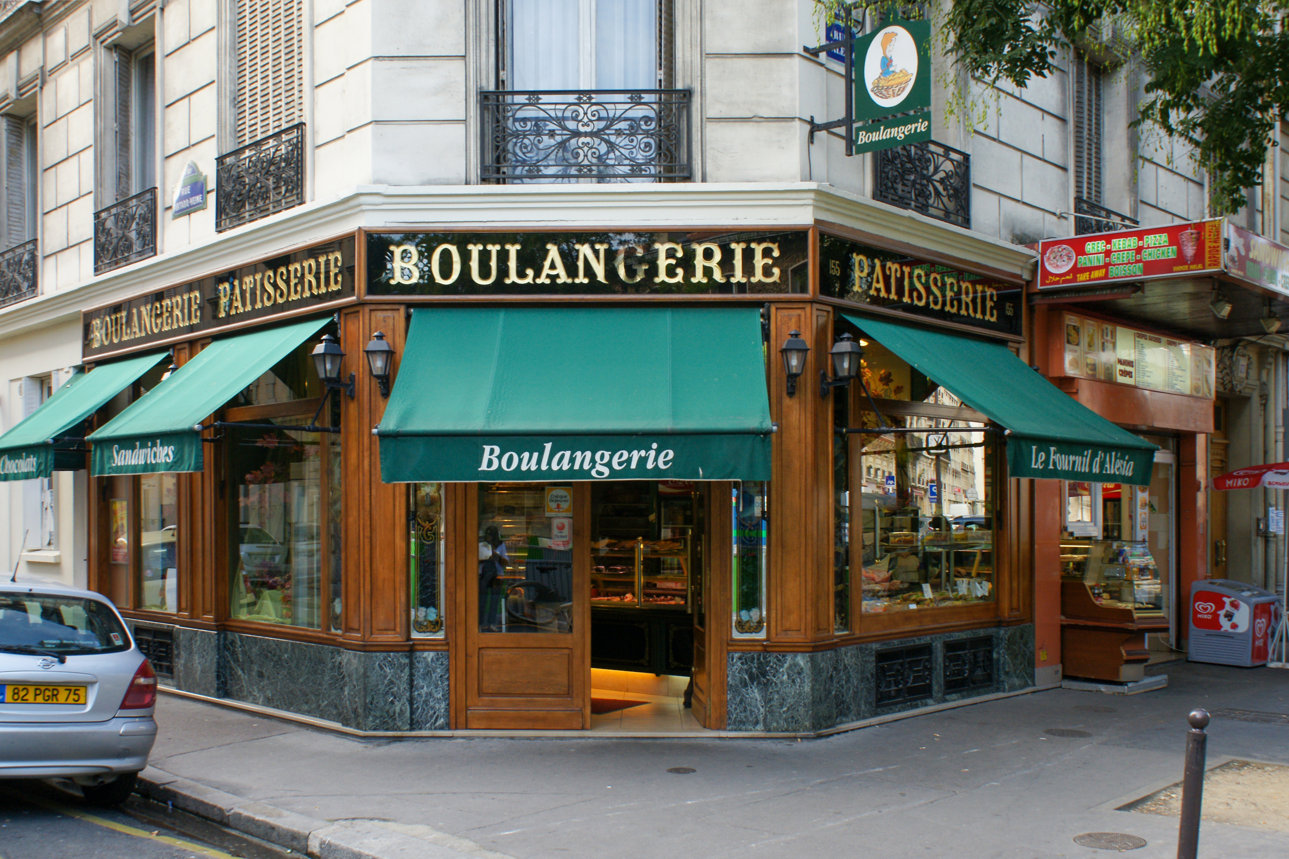 Boulangerie, 155 rue d'Alésia, Paris, France (monument historique) .